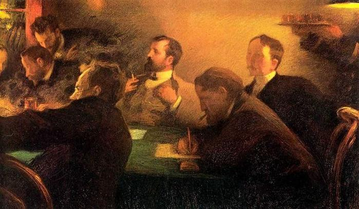 Л.Пастернак Заседание совета художников - преподавателей Московского училища живописи, ваяния и зодчества. 1902 Г.